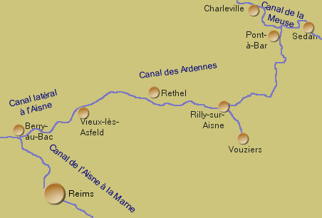 Plan des "Canal des Ardennes" in der Region Champagne-Ardenne, Frankreich